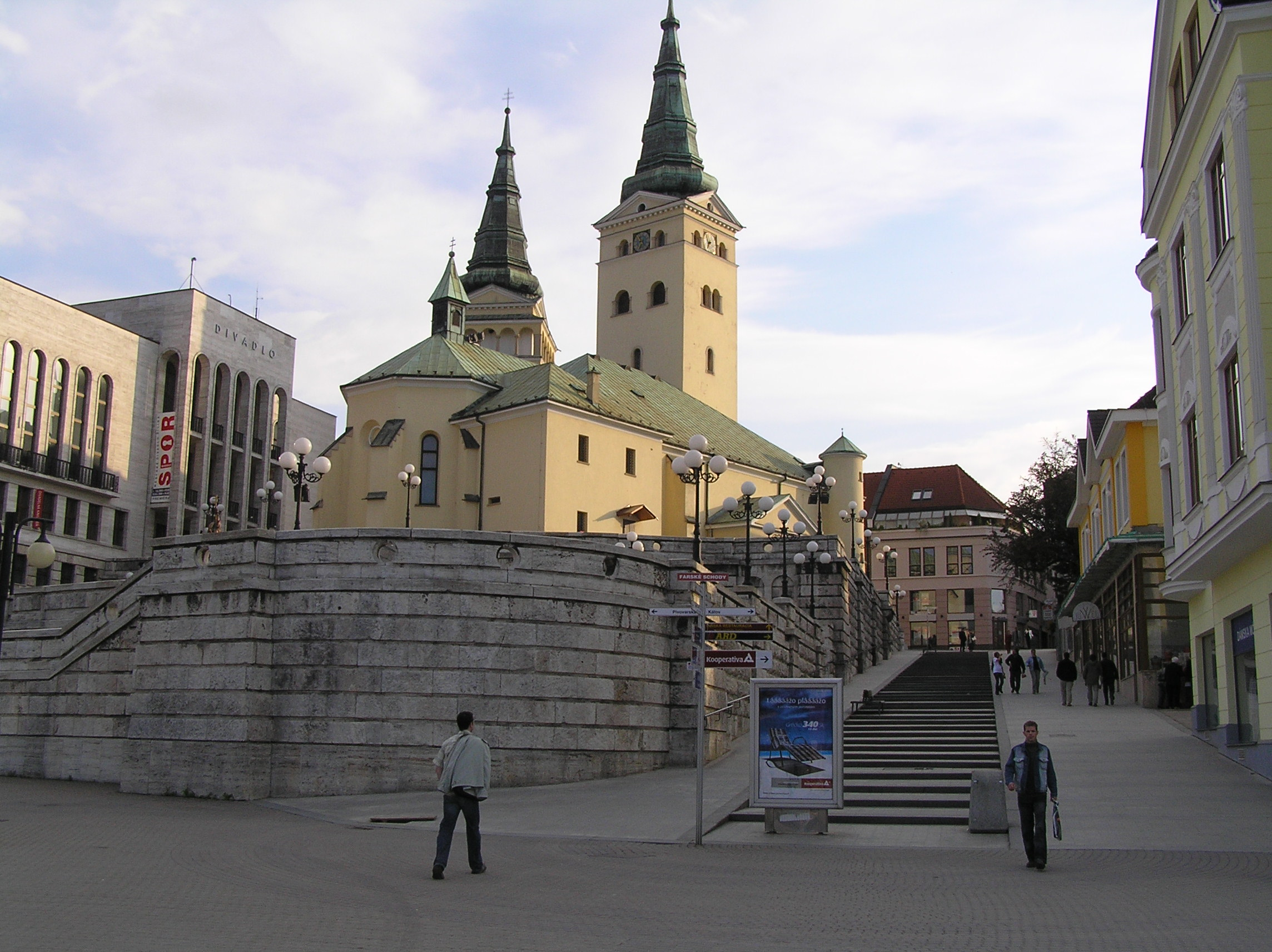 Divadlo, kostol a farské schody Námestie Andreja Hlinku, Žilina